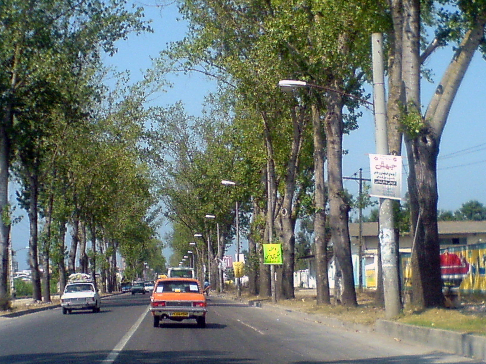 Babol Sar